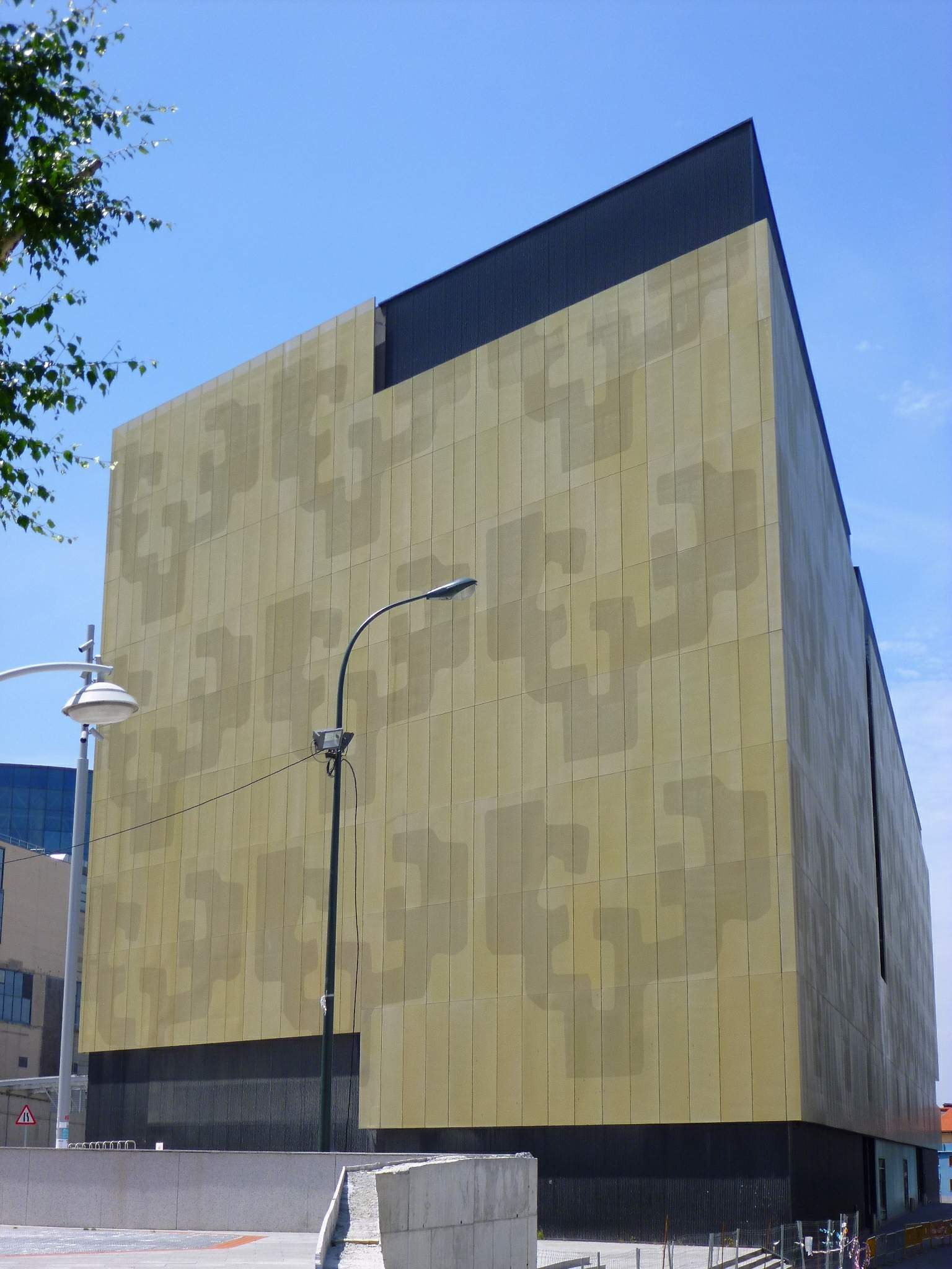 Edificio de las Escuelas Universitarias de Ingeniería Técnica Industrial y las de Minas y Obras Públicas (EUITI y Minas, UPV-EHU), en Bilbao